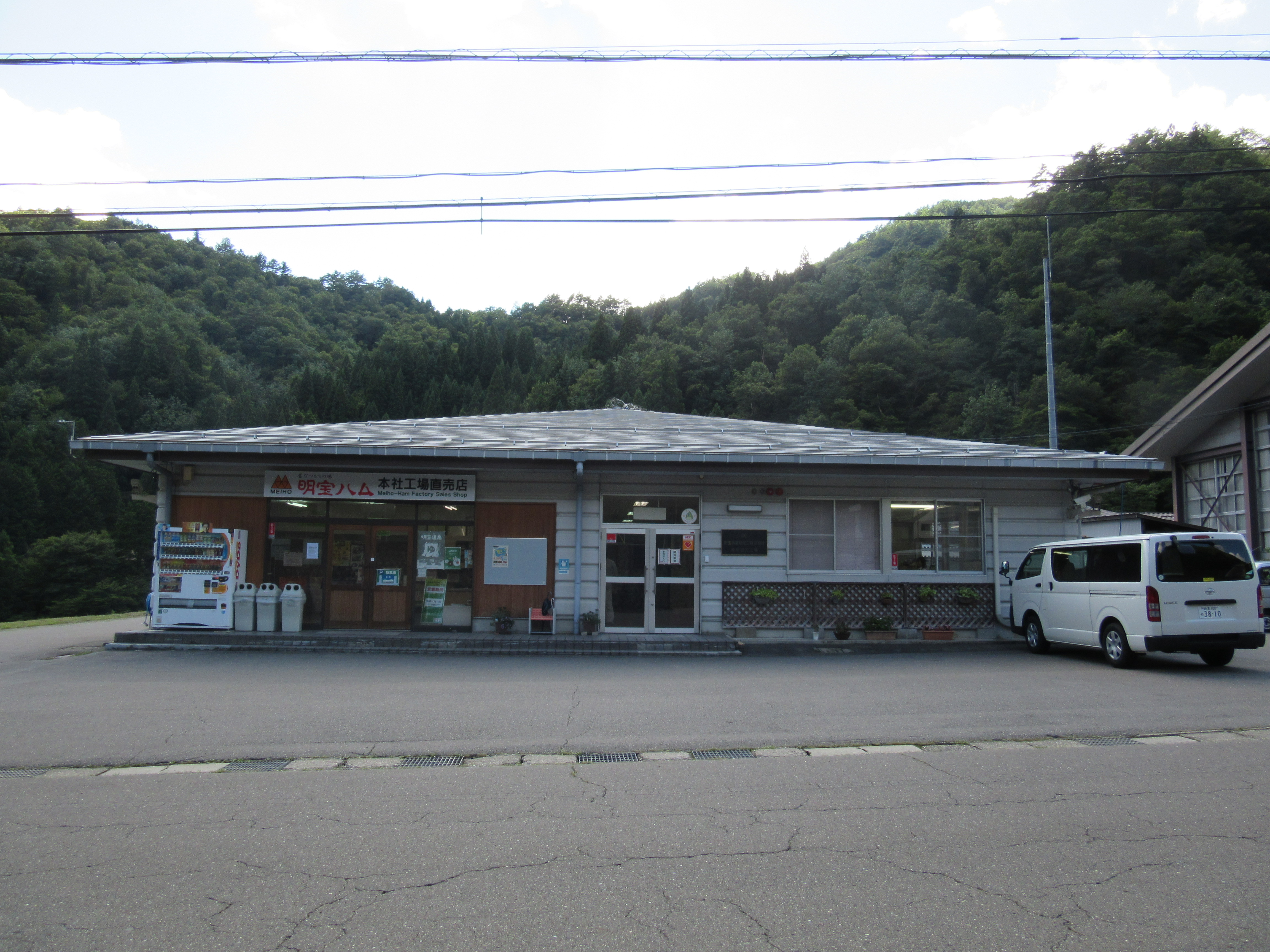 明宝ハム本社